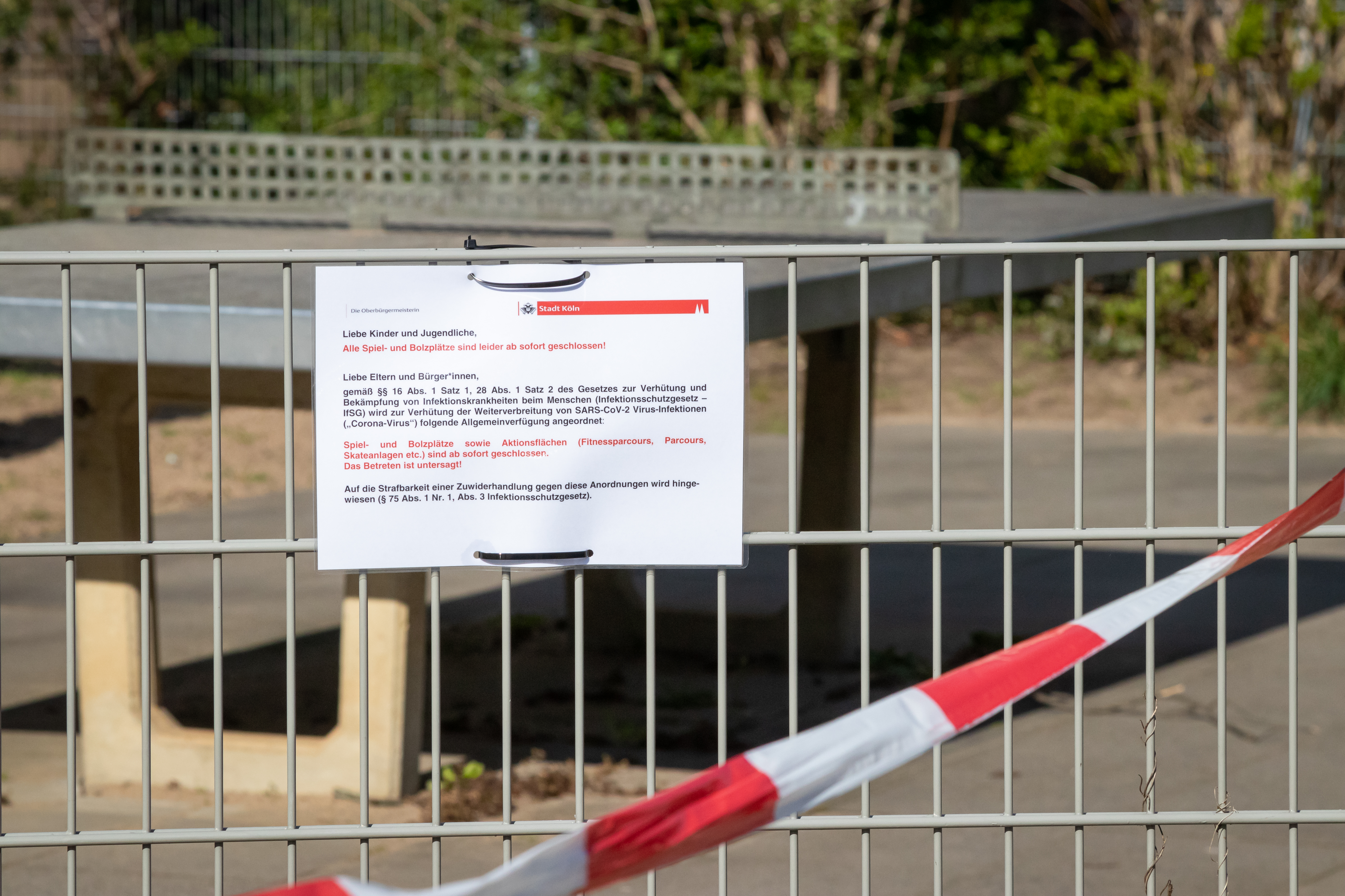 Gesperrter Spielplatz in Köln-Neuehrenfeld aufgrund der Covid-19-Pandemie